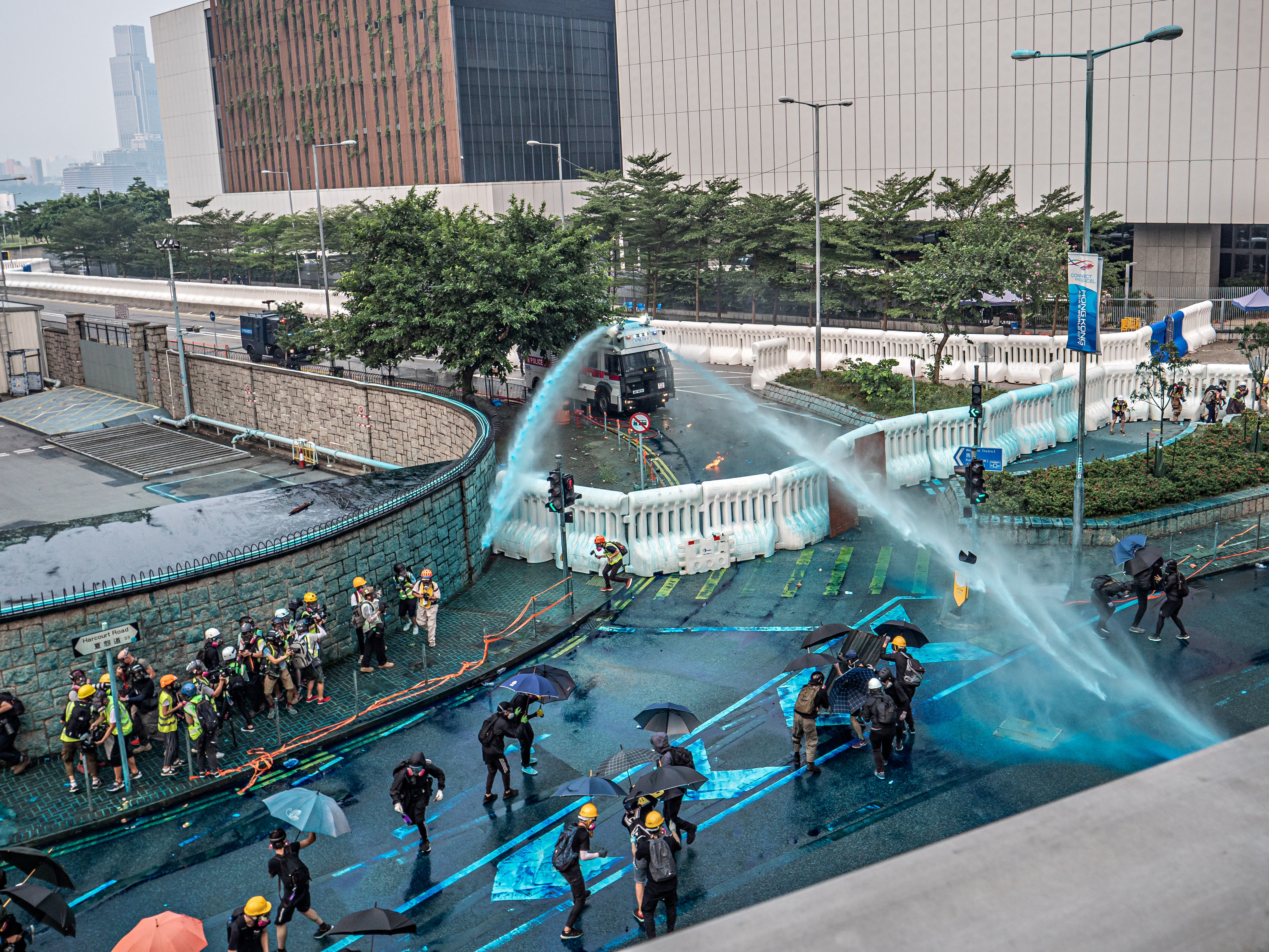 2019-09-29 全球反極權大遊行 Anti-totalitarianism rally (Hong Kong)